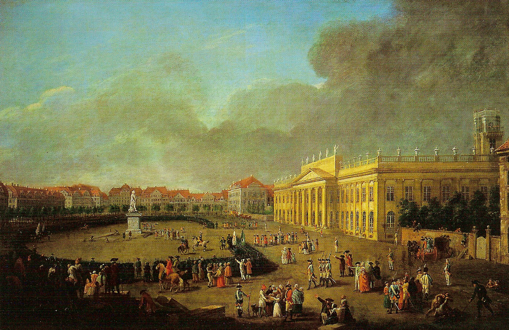 Die Enthüllung des Denkmals Landgraf Friedrichs II., Öl auf Leinwand; 89,5x136,5 cm; Neue Galerie Kassel. Rechts das Museum Fridericianum, in der Bildmitte hinten das Weiße Palais; das Rote Palais ist noch nicht gebaut.